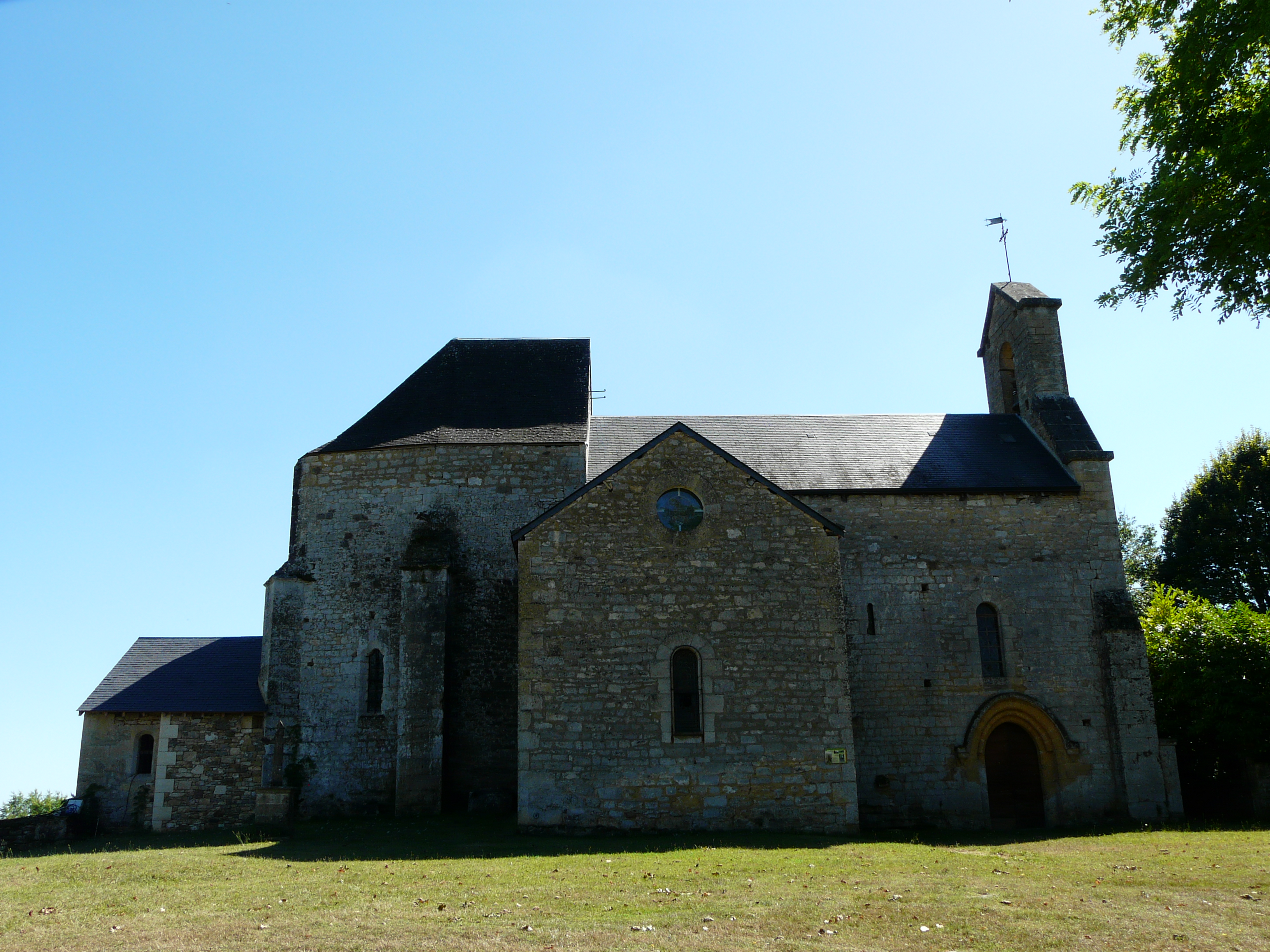 L'église Saint-Côme-et-Saint-Damien de Simeyrols, Dordogne, France.